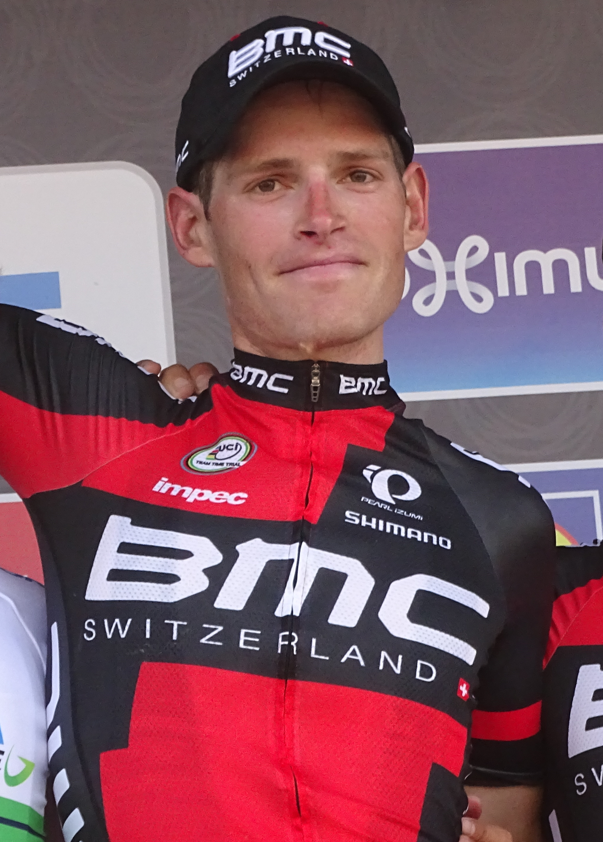 Ben Hermans sur le podium de la Flèche brabançonne 2015